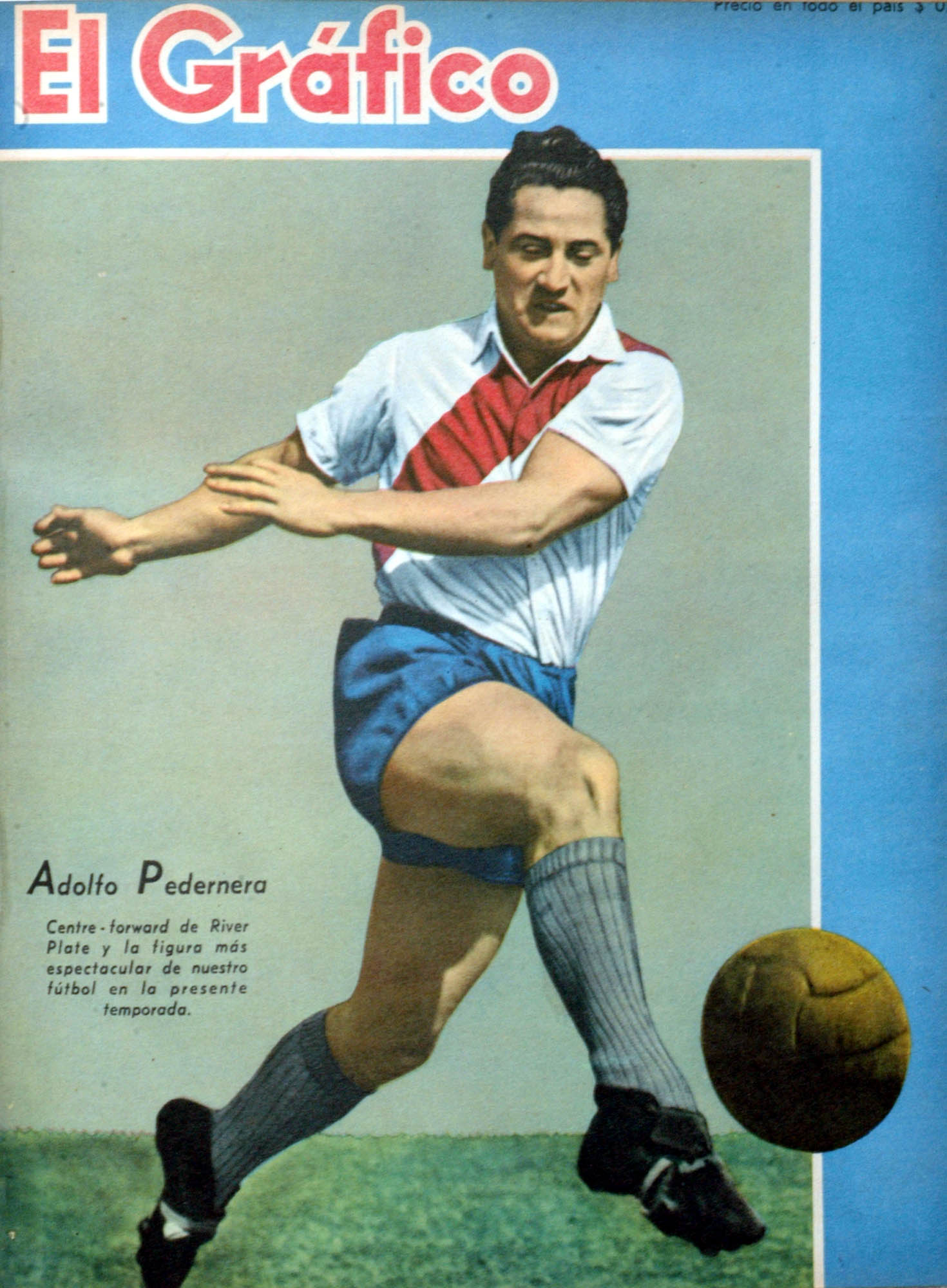 El Grafico del 03 de Septiembre de 1943. Edicion 1260